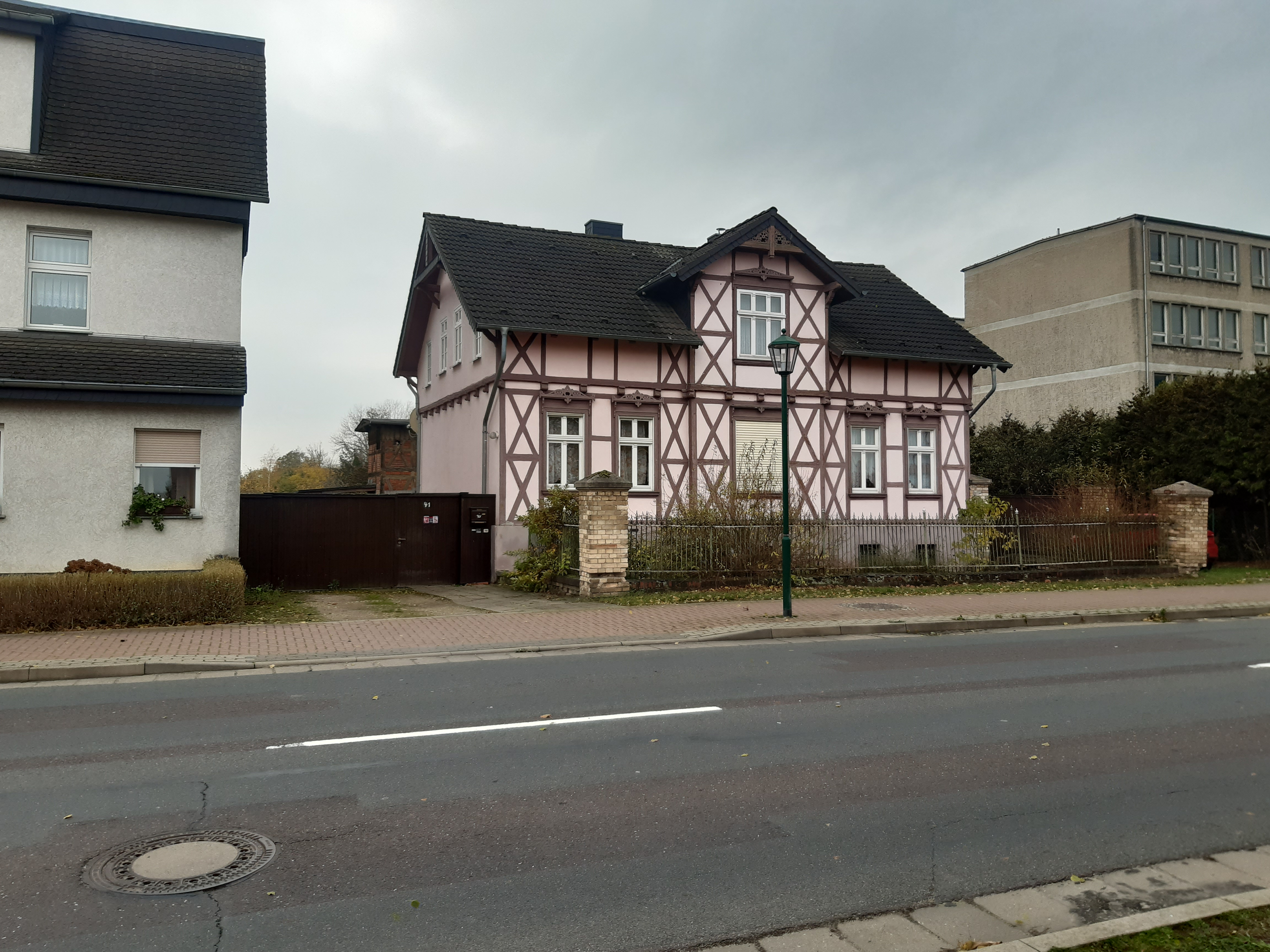 Fachwerkhaus